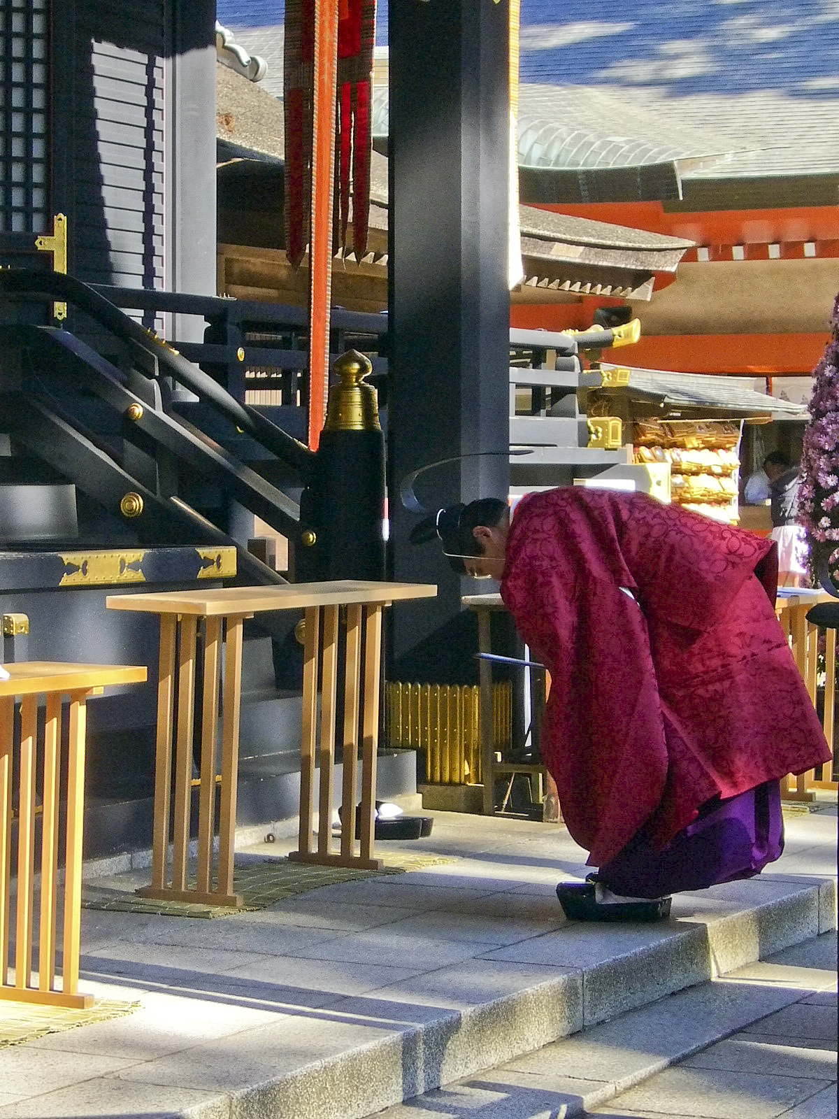 Shinto priest in full dress,kannushi,niinamesai,katori-jingu-shrine,katori-city,japan